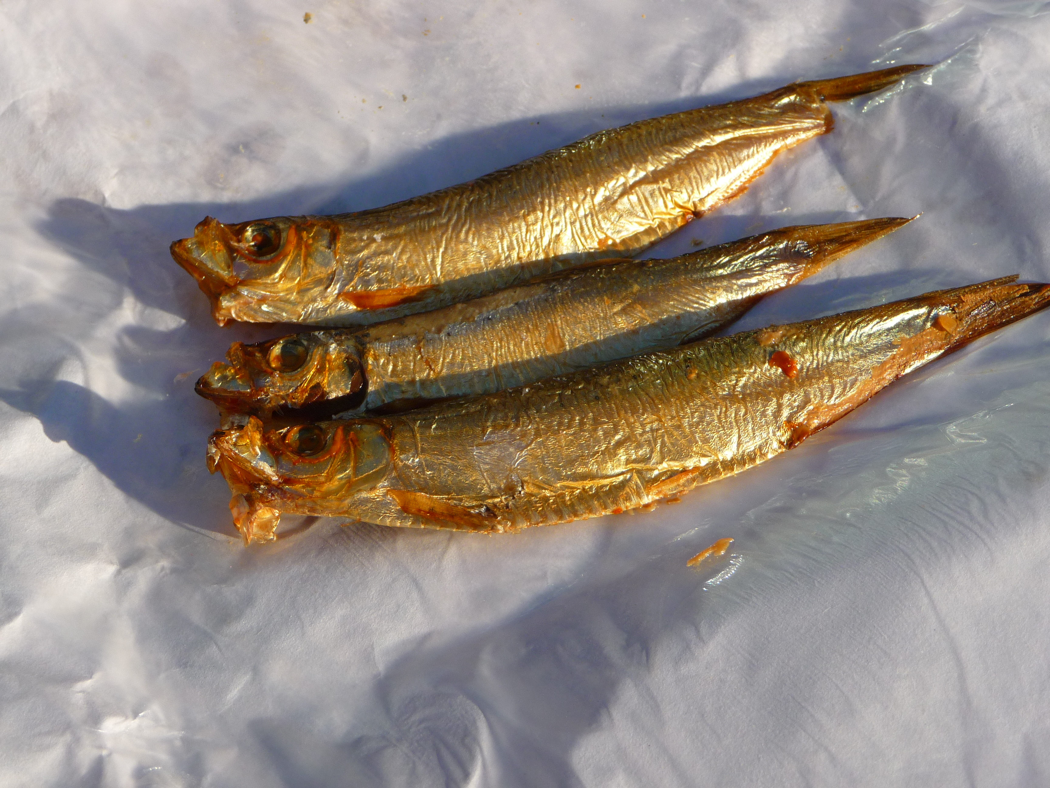 Geräucherte Sprotten, genannt Kieler Sprotten